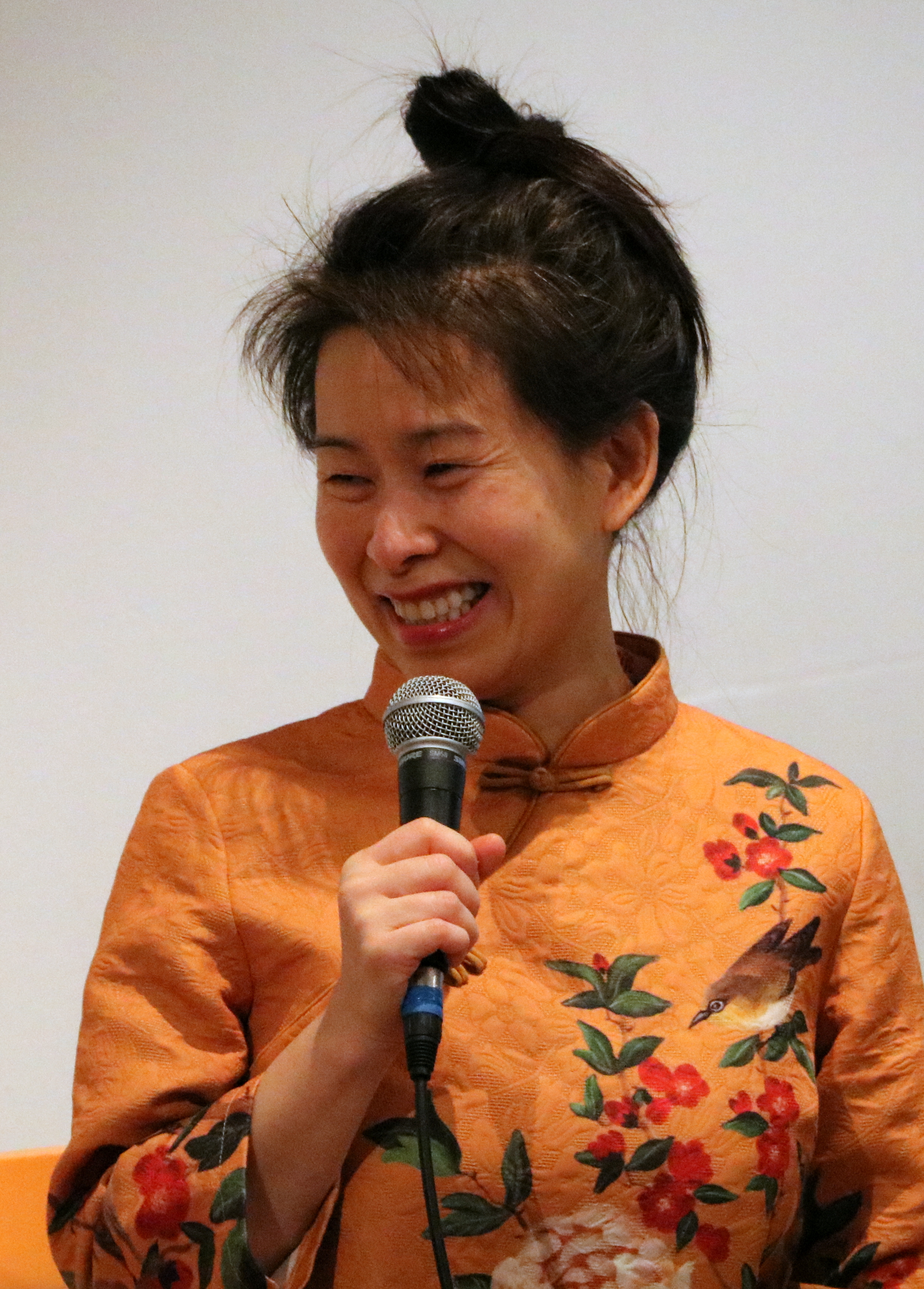 Kim Thúy lors du Festival Atlantide - Les Mots du Monde à Nantes, le Lieu Unique, le 17 février 2018.